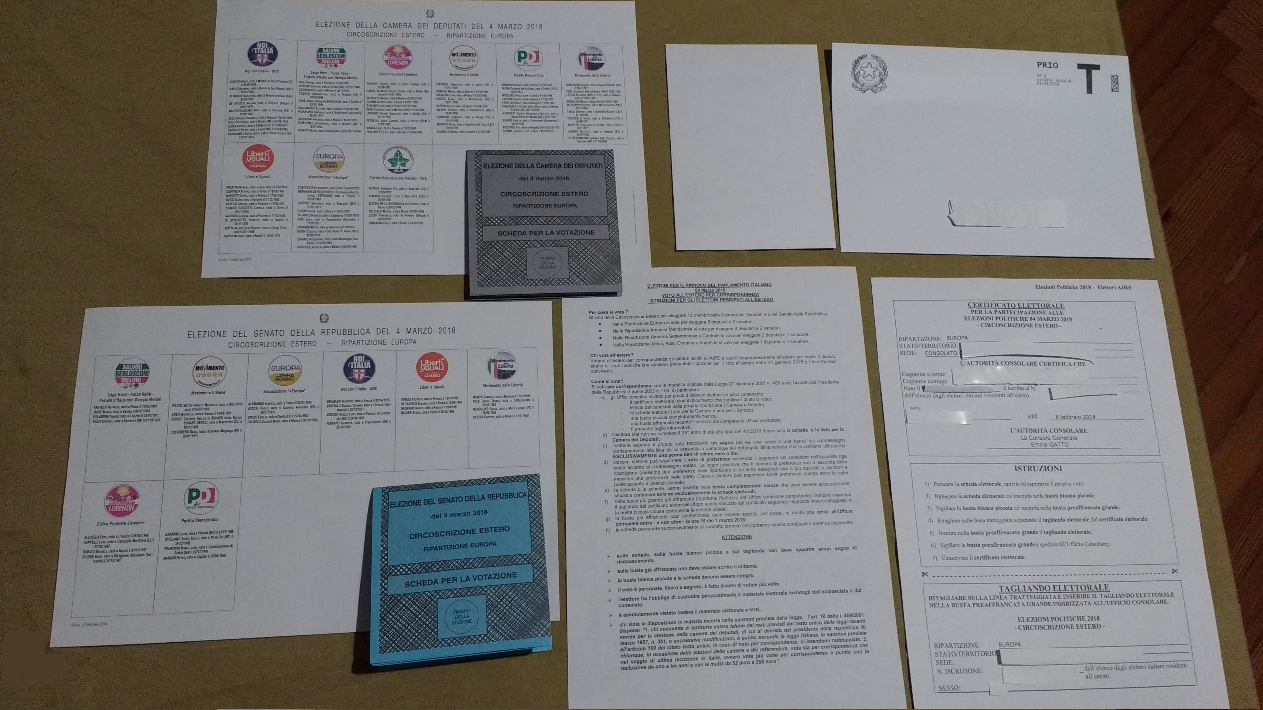 Contenuto del plico elettorale per le elezioni politiche del 4 Marzo 2018 nella circoscrizione Estero. Voto per corrispondenza.